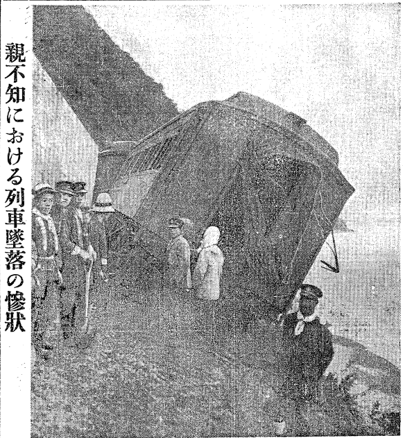 1930年（昭和5年）11月6日北陸本線市振 - 親不知間において起った大阪発青森行急行列車の脱線事故の写真